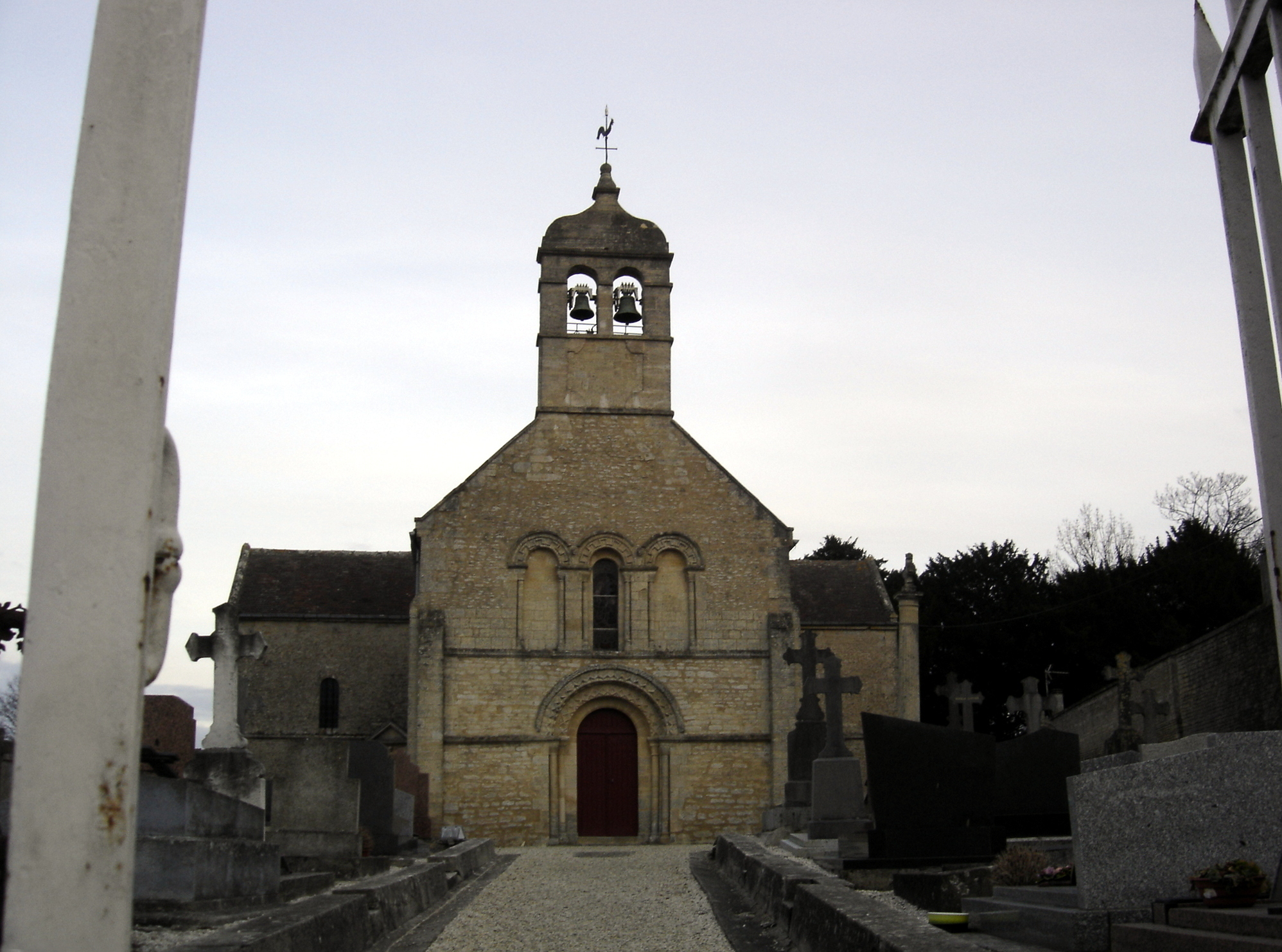 église de Cresserons, façade occidentale et clocher